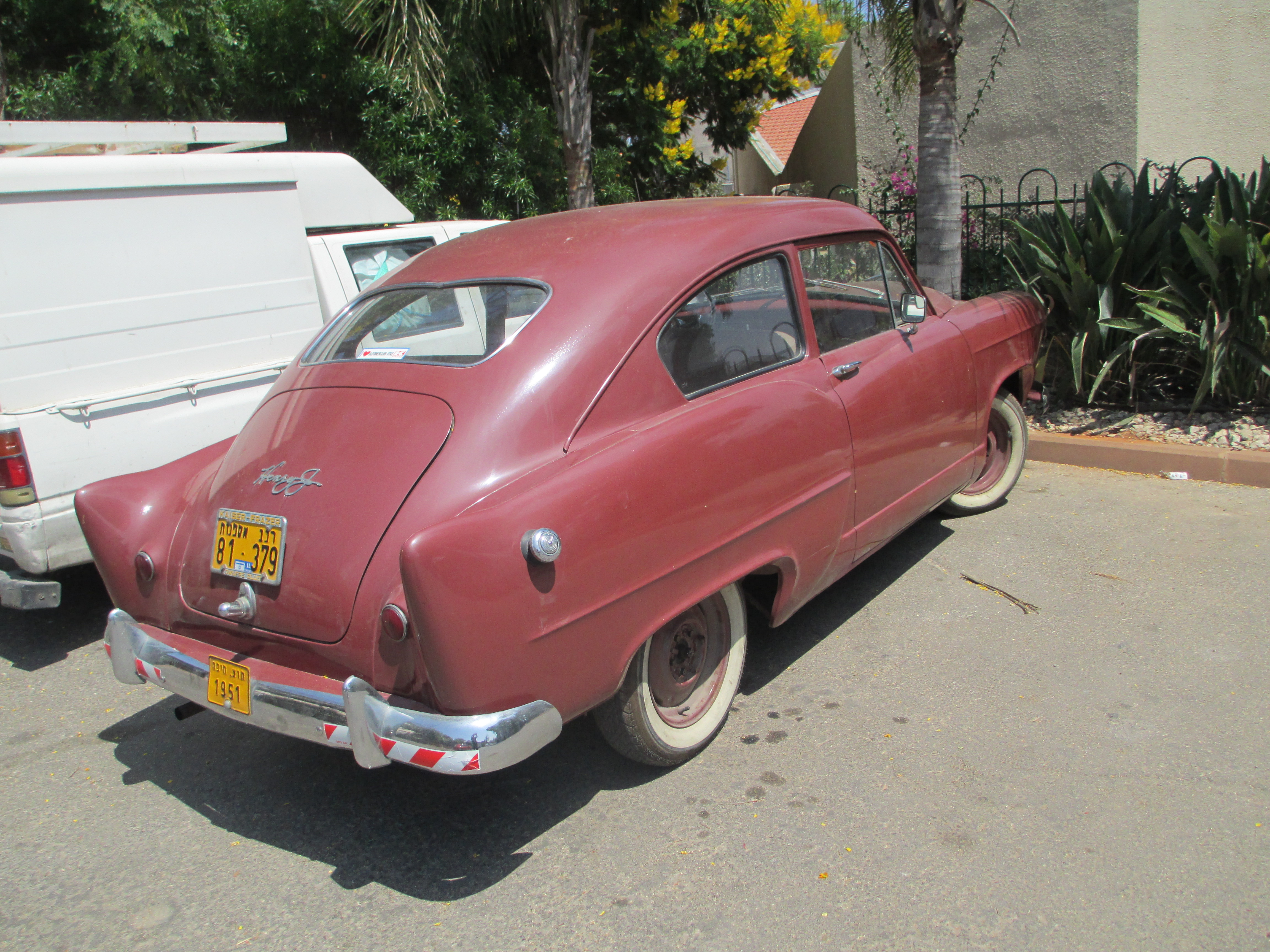 רכב אספנות הנרי ג'י בישראל